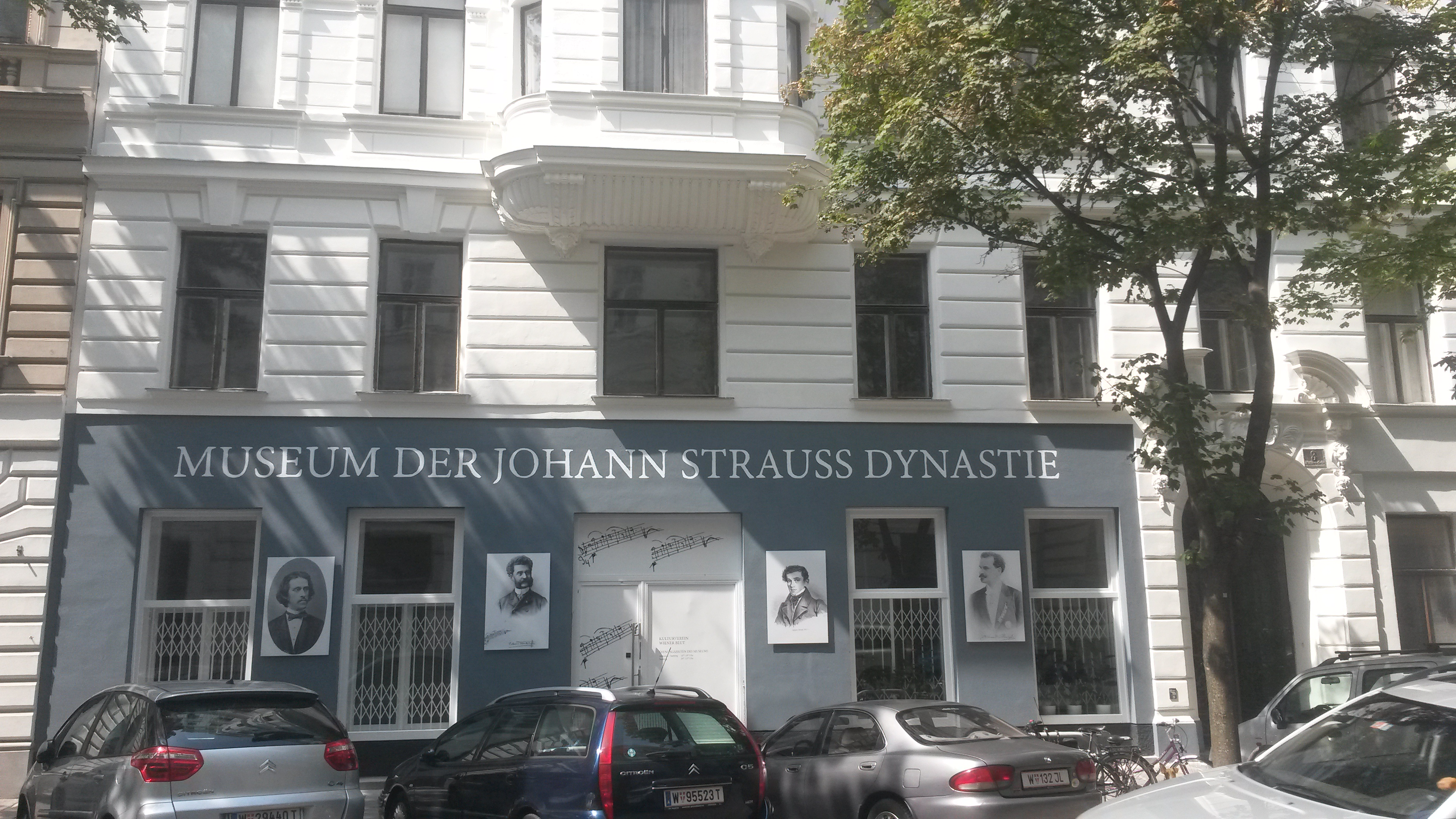 Eingang des Johann Strauss Museums, 1090 Wien, Müllnergasse 3.